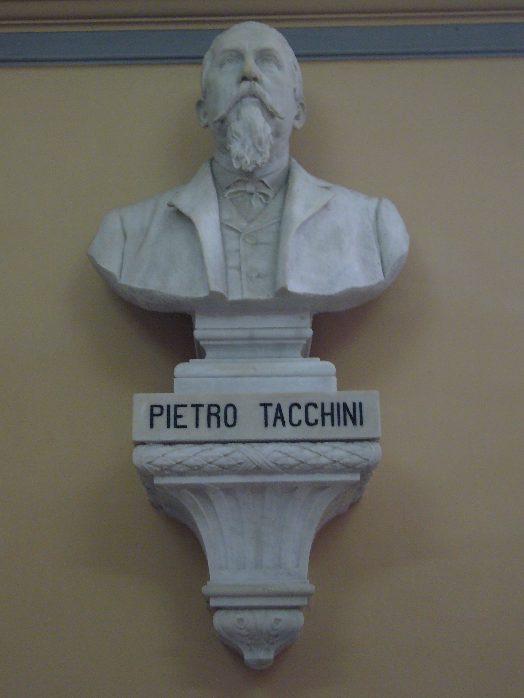 Roma, busto di Pietro Tacchini nella sede dell'UCEA (Ufficio Centrale di Ecologia Agraria), già Ufficio Centrale di Meteorologia da lui diretto